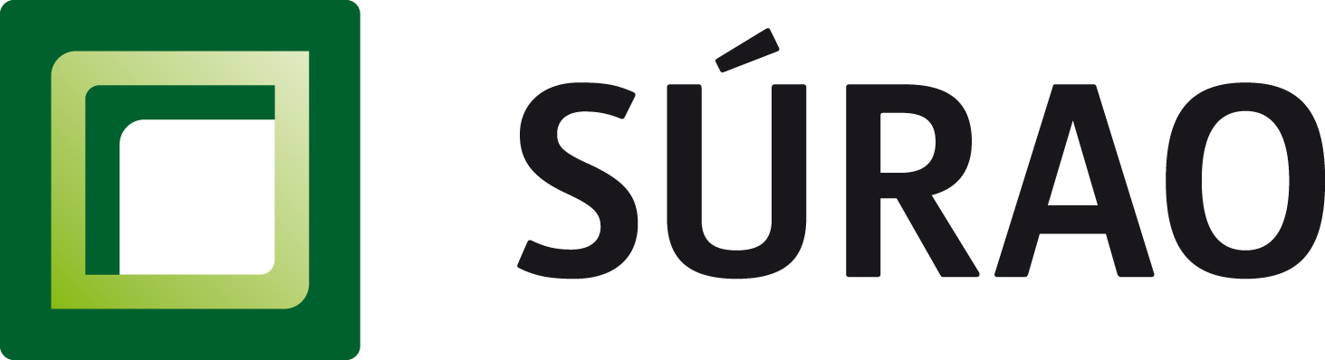 Logo Správy úložišť radioaktivních odpadů